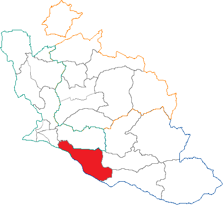 situation du canton de Cavaillon dans le département de Vaucluse (france)